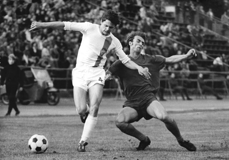 ADN-ZB-Lehmann-21.5.75-str-Berlin: Fußball-Oberliga BFC Dynamo - VorwärtsStralsund 2:0 Zweikampf im Stralsunder Strafraum zwischen zwei Verteidigern. Eigendorf (BFC/1) kann sich gegen Renn durchsetzen und flankt vor das Vorwärts-Tor. Mit diesem Sieg konnte der BFC sein Vorhaben verwirklichen, einen der begrehrten UEFA-Cup-Plätze zu erhalten.